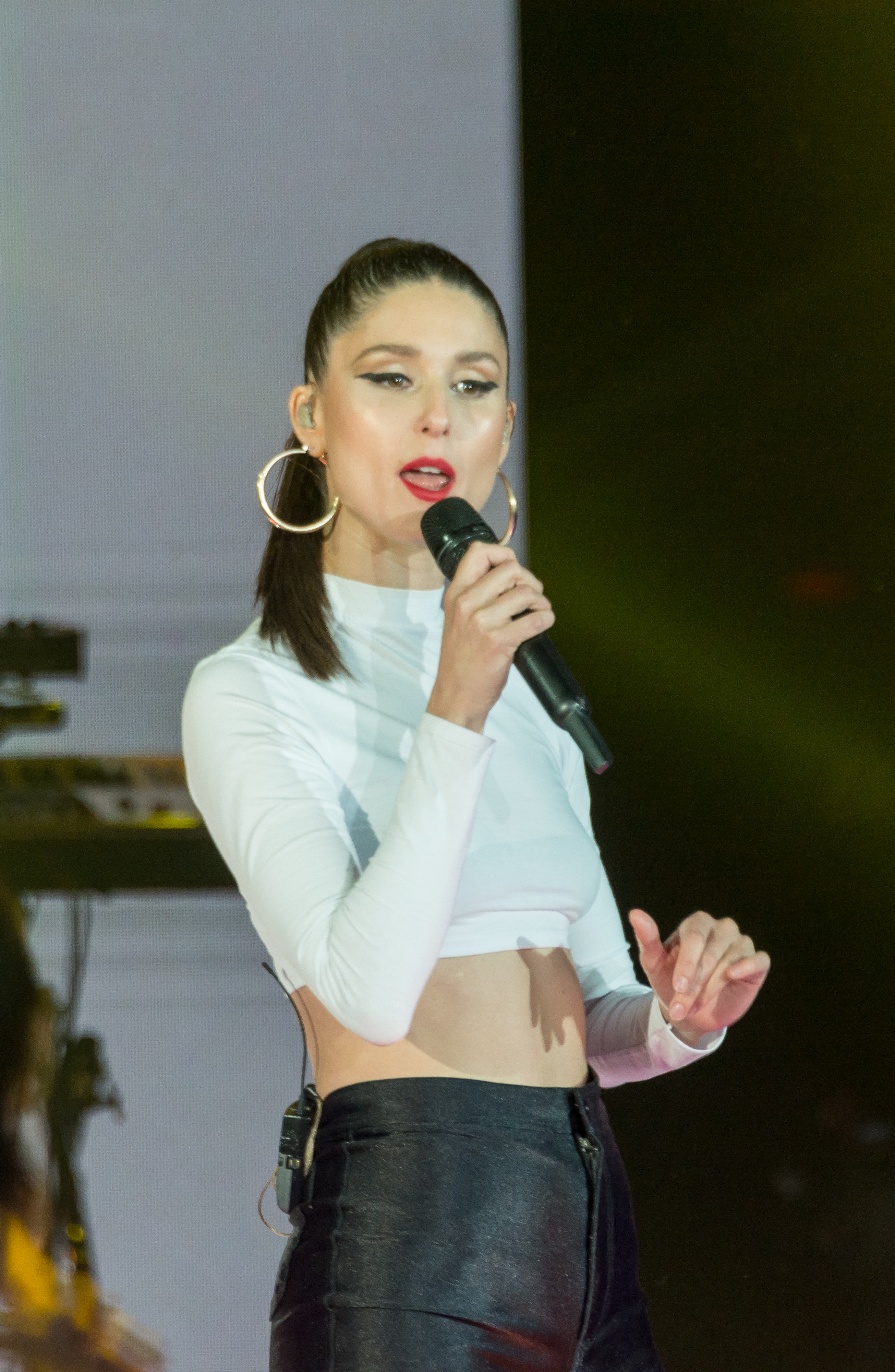 Francisca Valenzuela, Premios Pulsar 2019, Teatro Teletón, Santiago, Región Metropolitana, Chile.